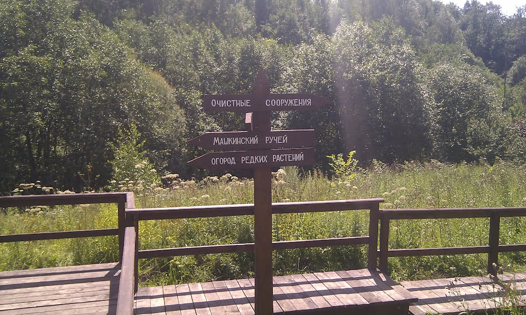 Долина Машкинского ручья (Водоохранная зона Машкинского ручья), округ This image is related to the protected area of Russia number 7710070